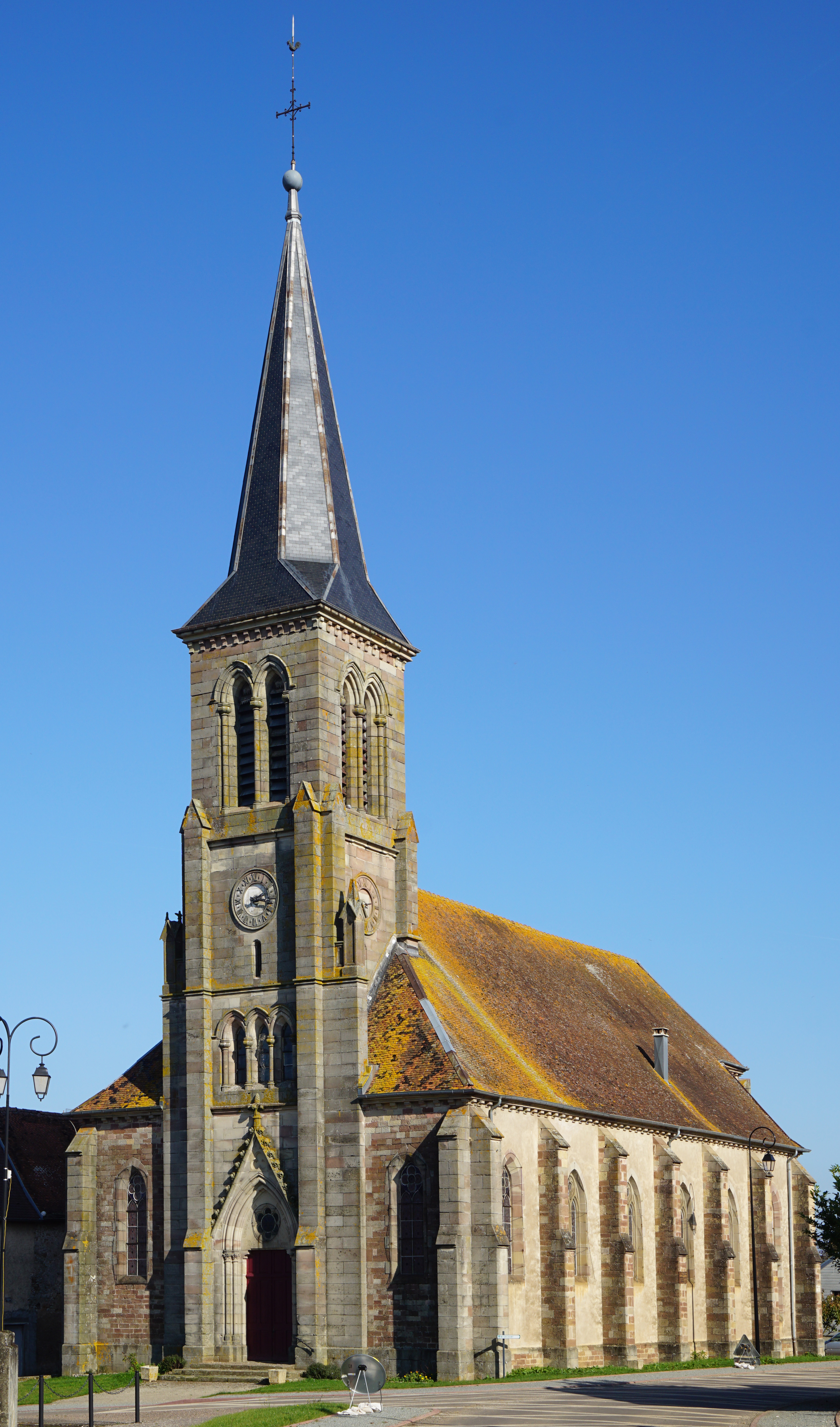 L'église de La Villedieu-en-Fontenette.